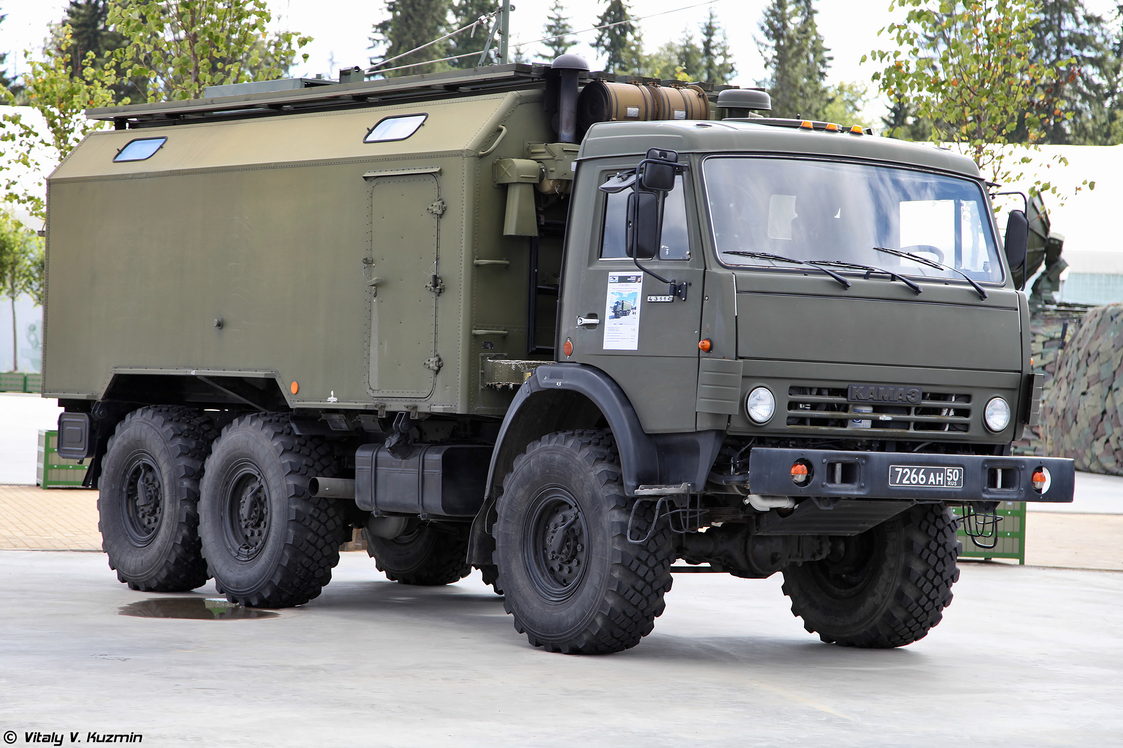 Машина комплекса поиска и пеленгования источников радиоизлучений Свет-КУ (Svet-KU ECM vehicle)